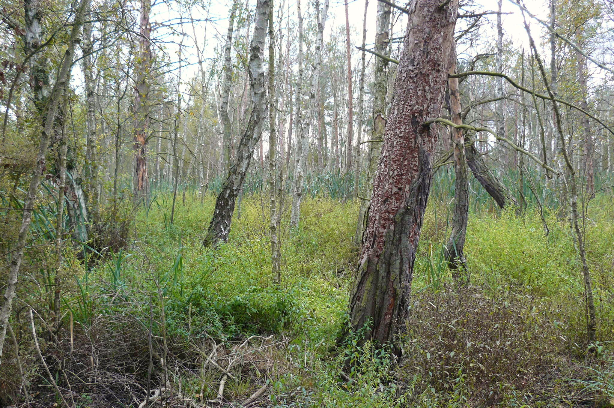 Bagno Chlebowo - tereny podmokłe.